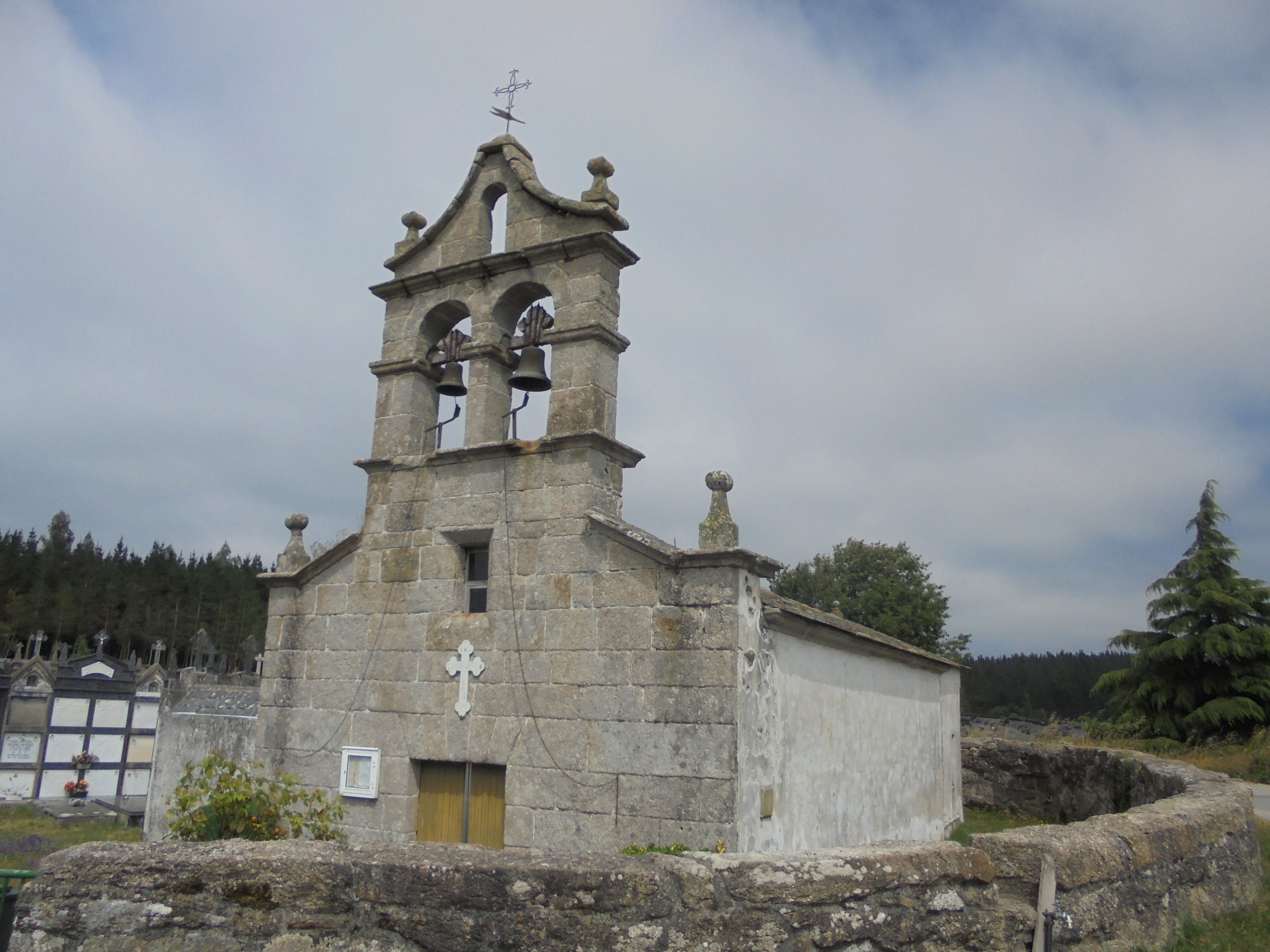 Igrexa parroquial de San Xillao de Rubiás ( Lugo)